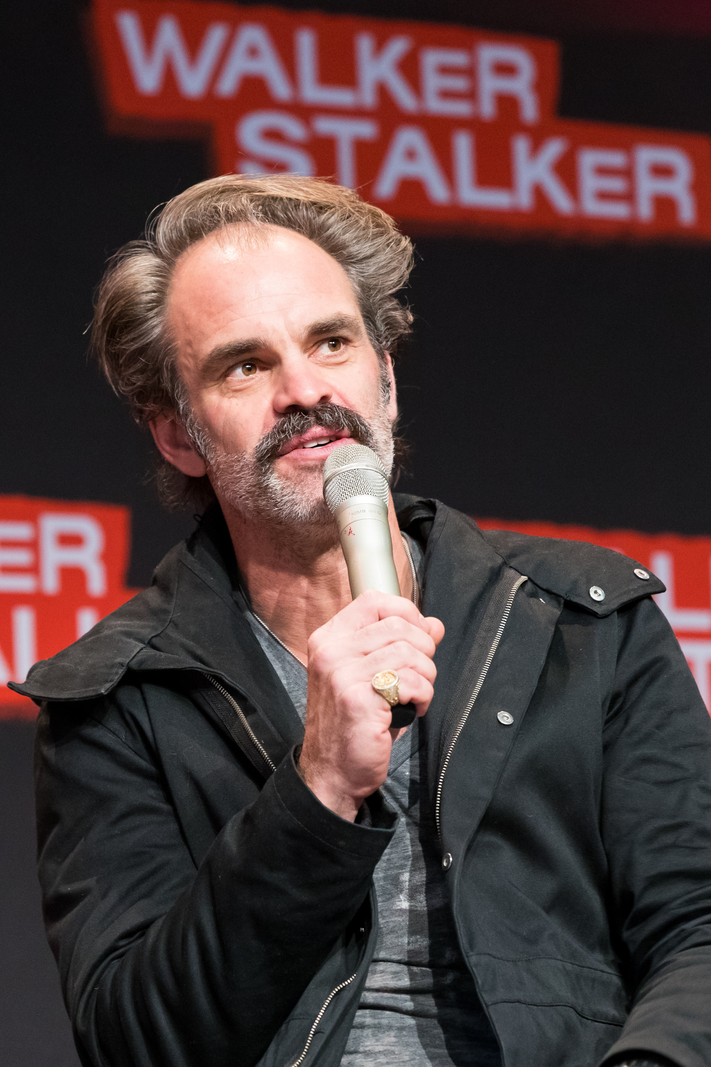 Steven Ogg during Walker Stalker Con at Maimarkthalle, Mannheim, Baden-Württemberg, Germany on 2018-03-17, Photo: Sven Mandel